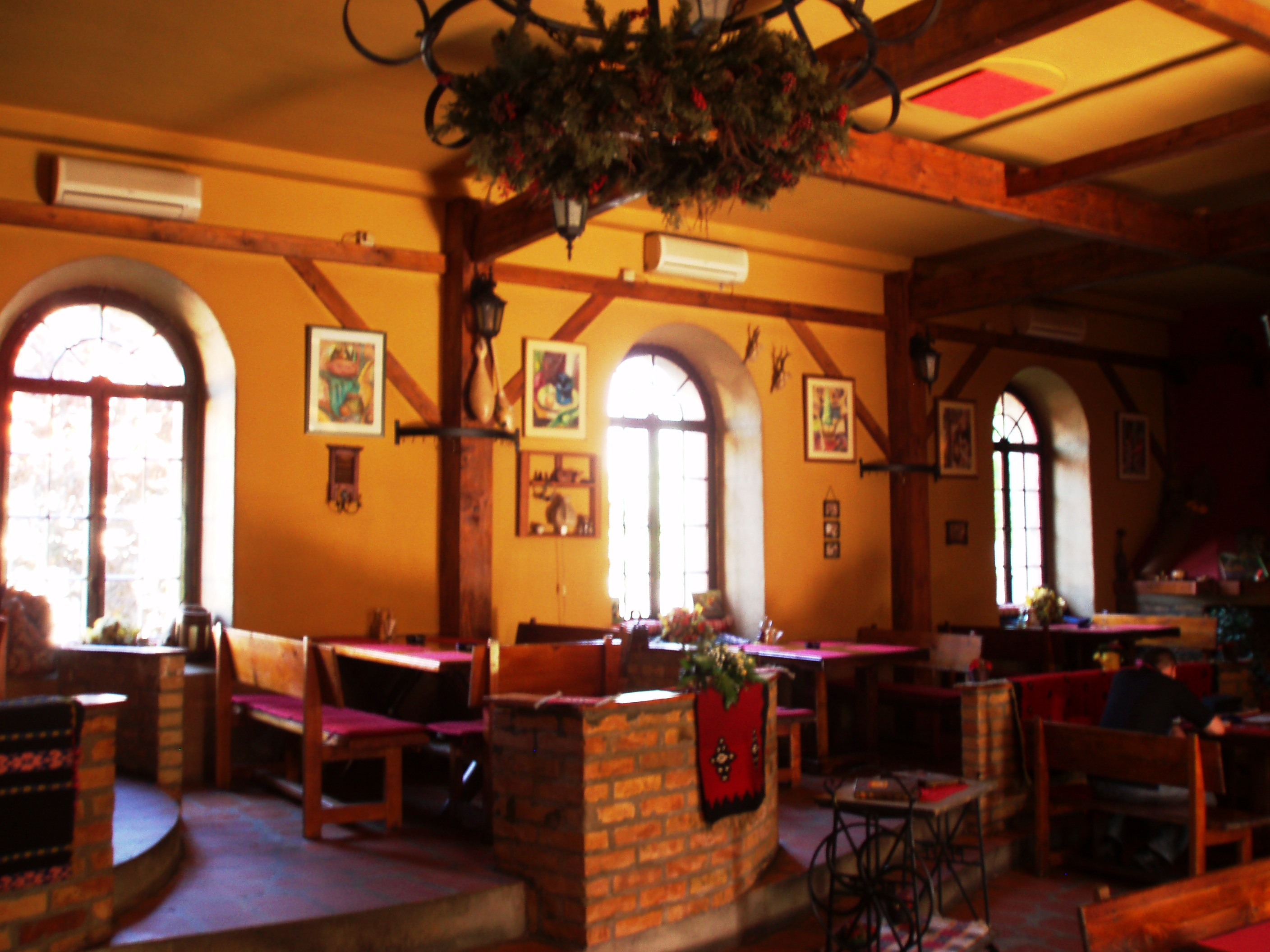 Фотографија Земунске синагоге унутрашњи изглед улични прозори, аутор фотографије: Nicolo